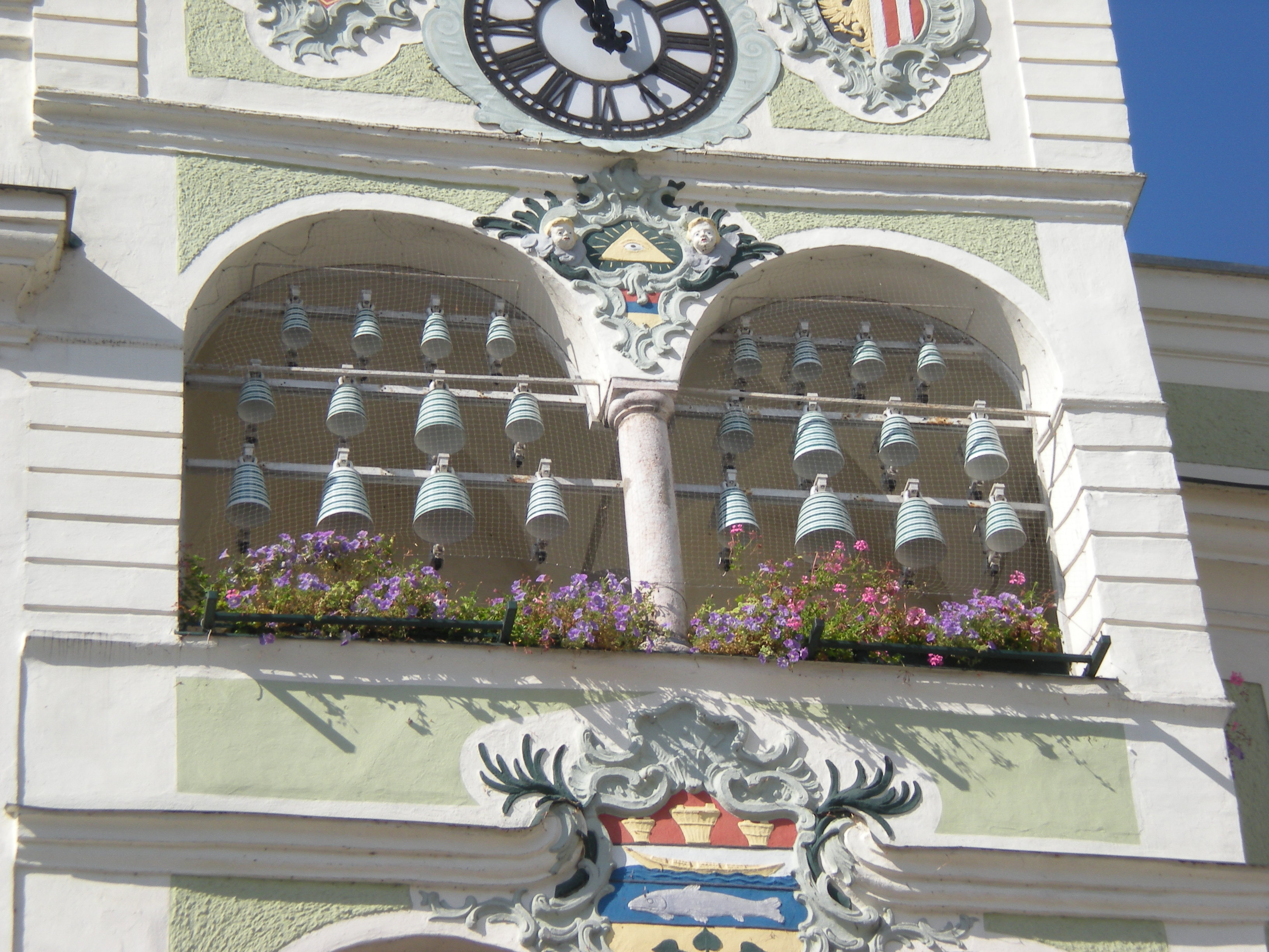 Rathaus